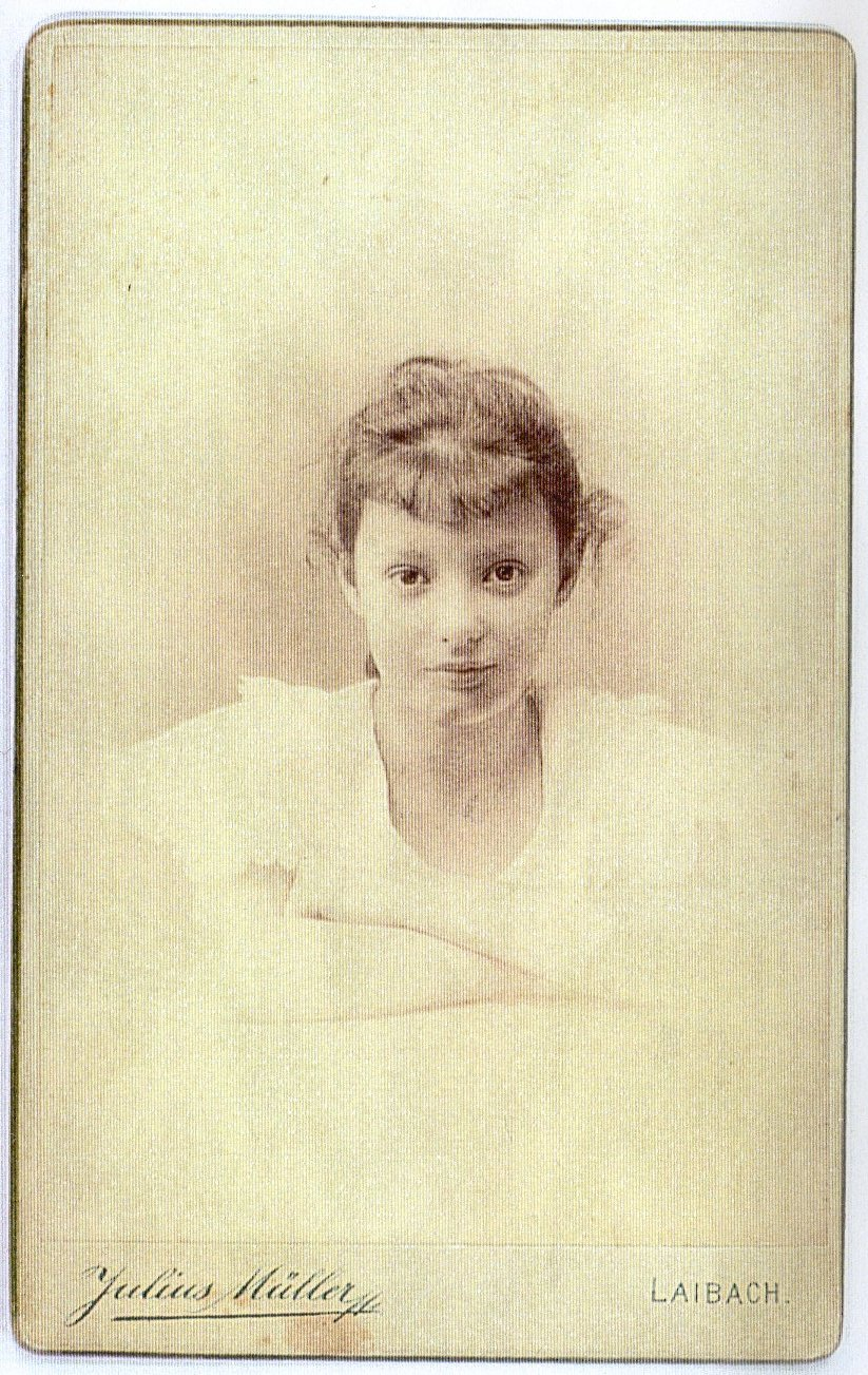 Portret mlade Lili Novy.